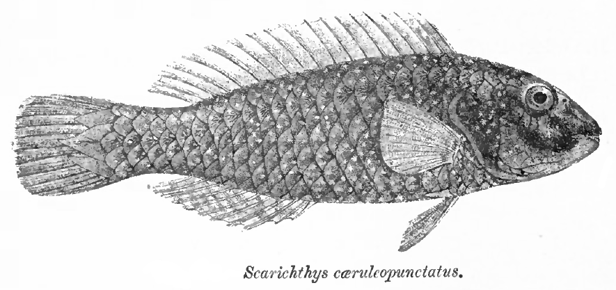 Scarichthys caeruleopunctatus = Leptoscarus vaigiensis (Quoy & Gaimard, 1824)